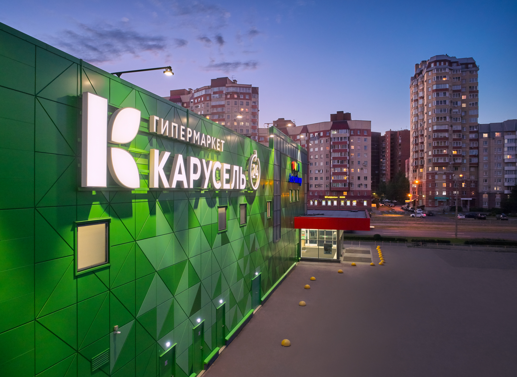 С апреля 2018 года гипермаркеты «Карусель» открываются в новой концепции, также на новую концепцию переводили часть работающих гипермаркетов. Среди новаций - на полках выделены выгодные ценовые предложения, а также тематический ассортимент – актуальные новинки рынка, фермерские и локальные продукты, товары для здорового питания и многое другое, также есть кафетерий.